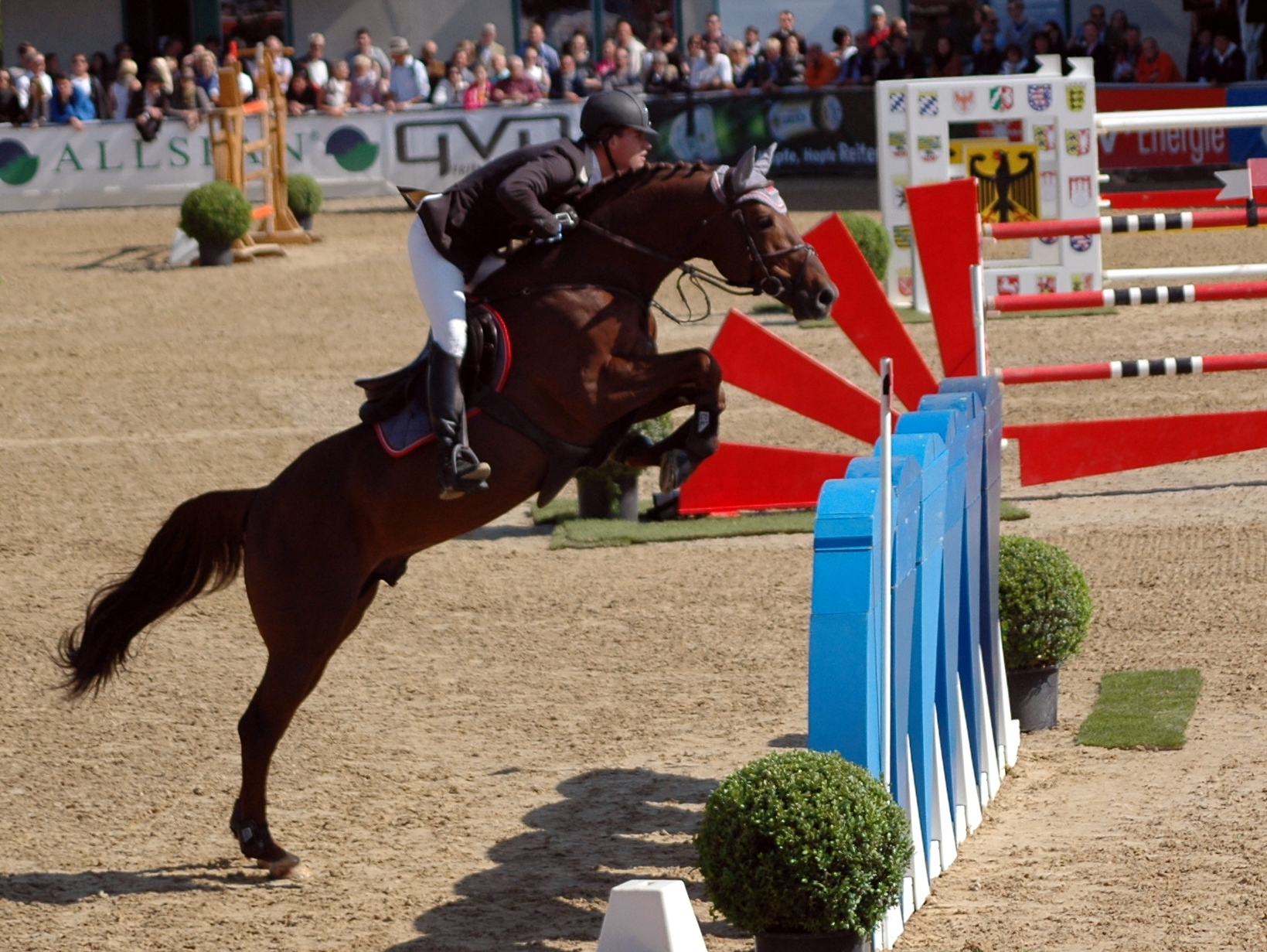 51. Maimarkt-Turnier: Jörg Oppermann mit Che Guevara